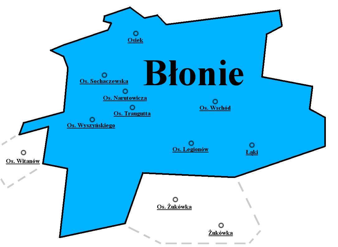 Błonie – miasto w woj. mazowieckim, podział na osiedla